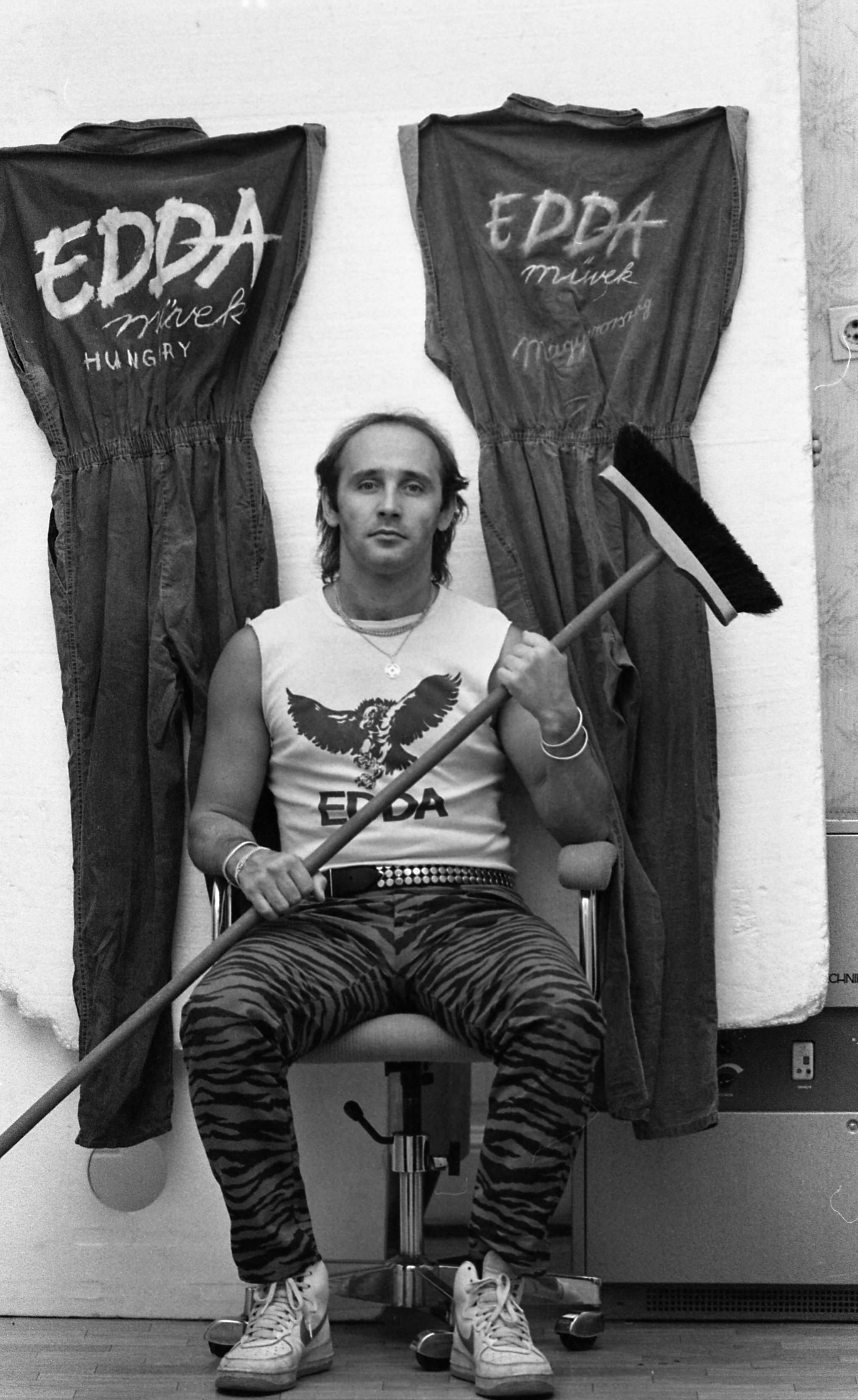 Pataky Attila magyar rockzenész.